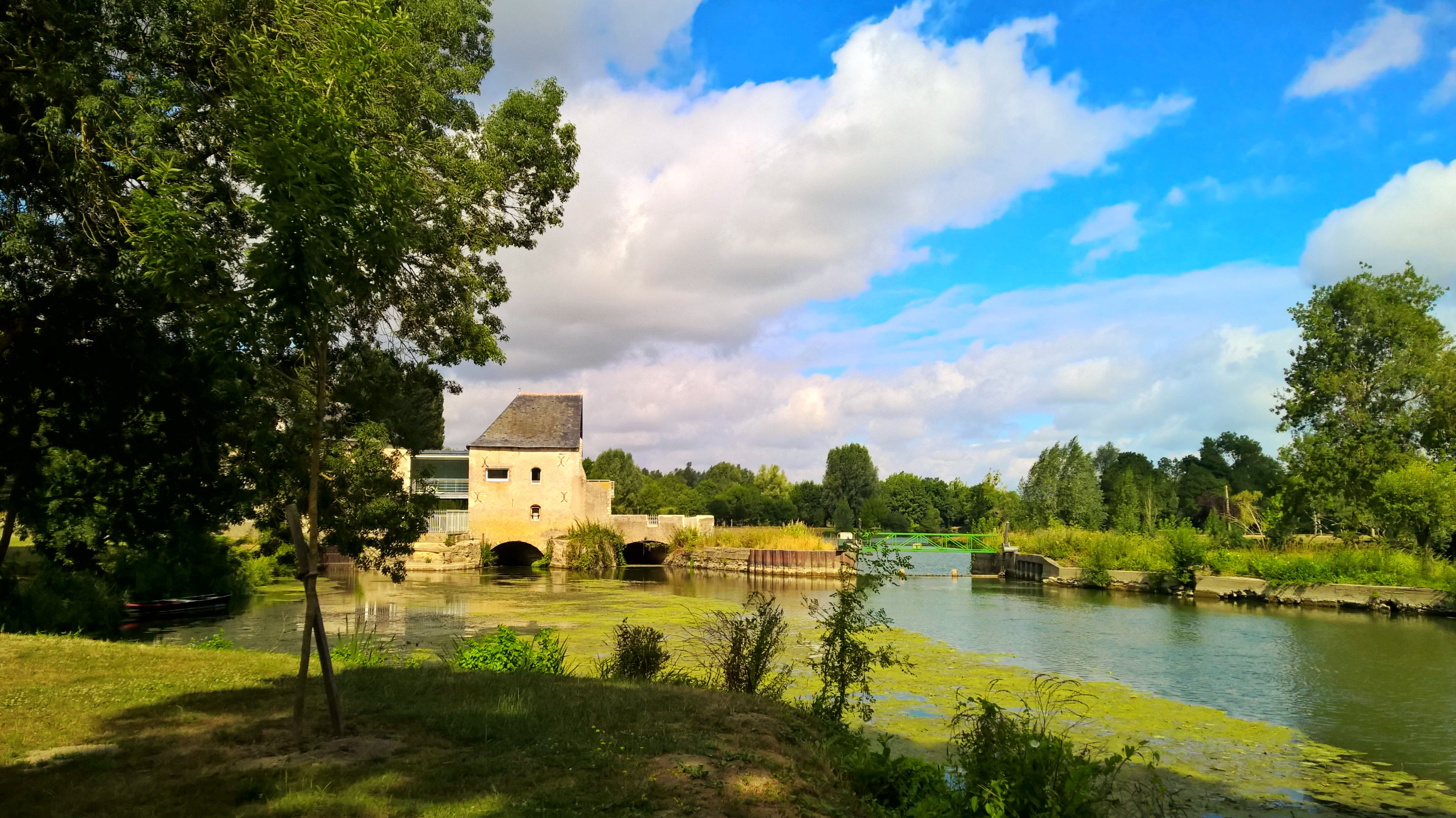 Moulin à eau dit moulin du Froment, sur les bords du Loir à Villevêque (Maine-et-Loire, France).